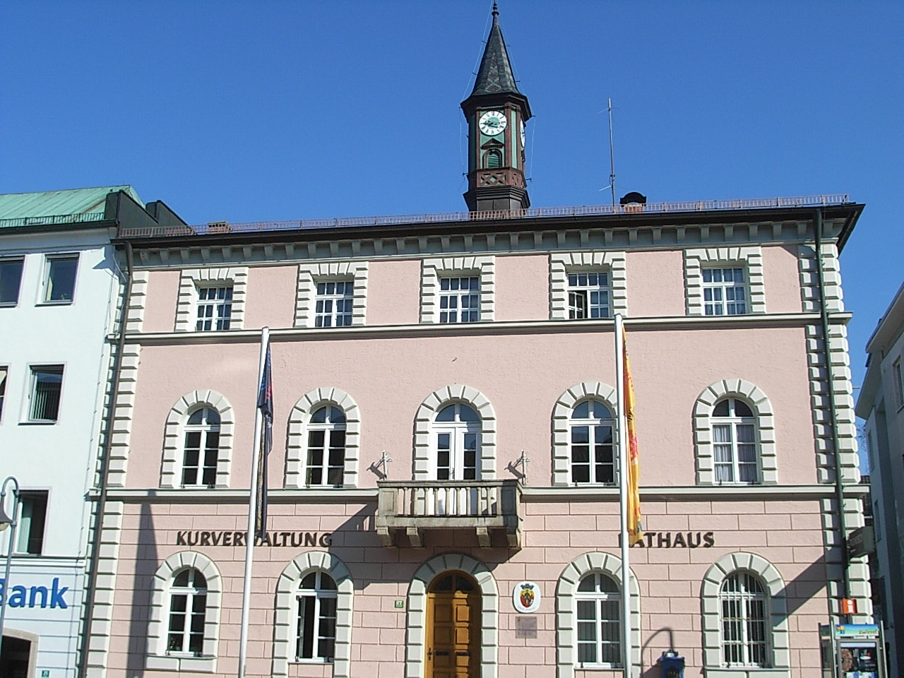 Rathaus vo Zwiesl